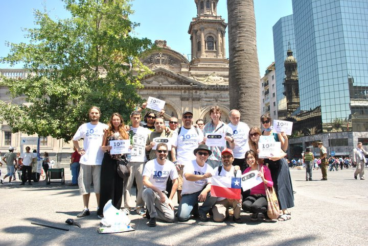 La AECH hace el suicidio homeopático en la Plaza de Armas de Santiago de Chile en febrero de 2011